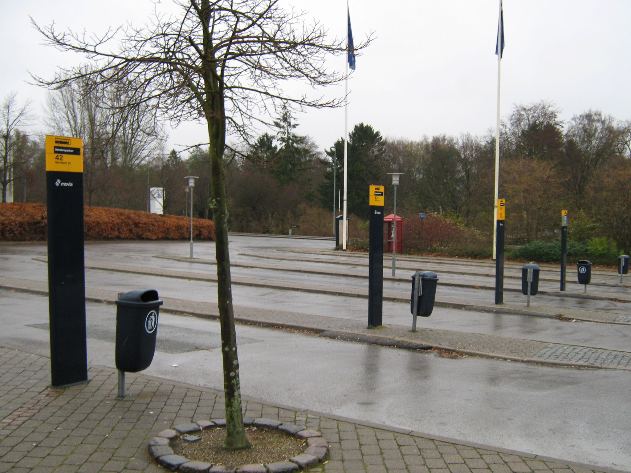 Værebroparken, Bagsværd